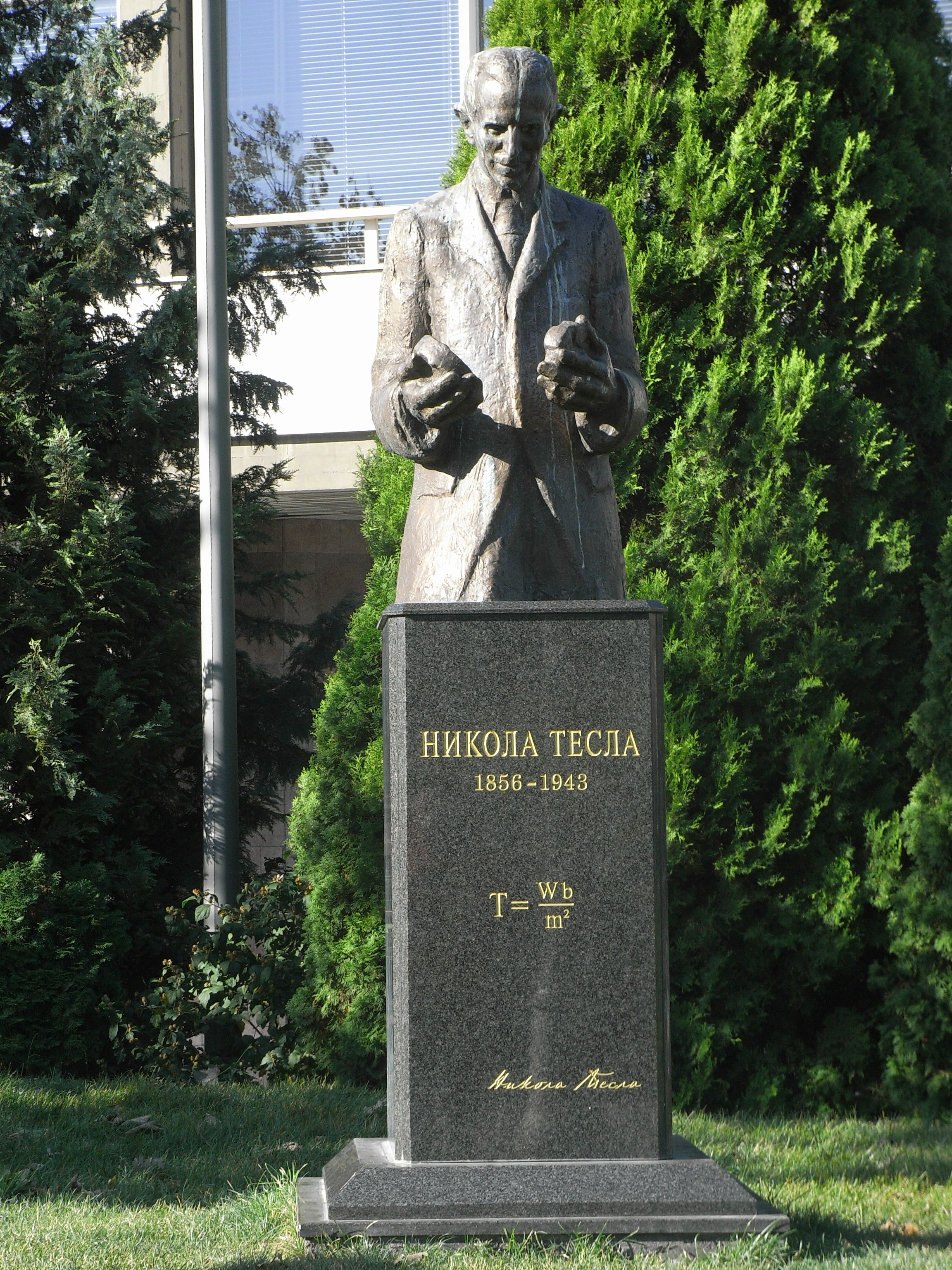 Nikola Tesla Statue in Belgrad